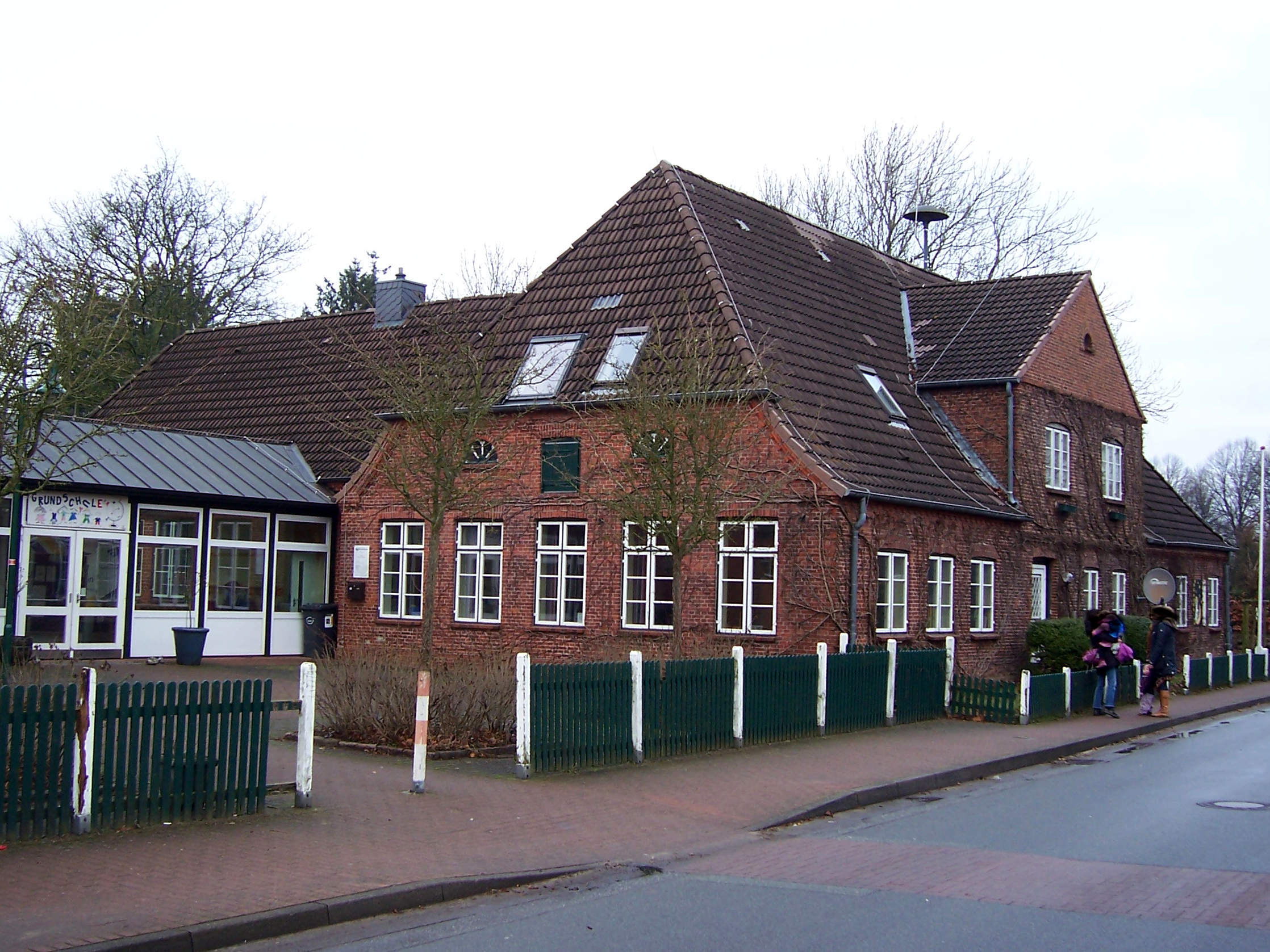 Neudorf Schulhaus